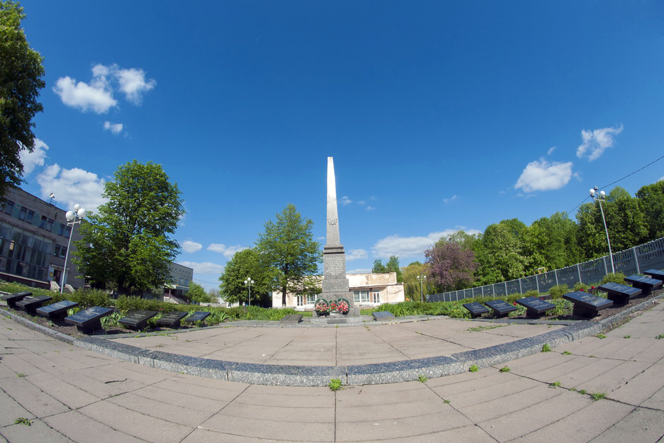 Пам'ятник воїнам-односельчанам., Попільнянський район, смт. Попільня, Попільнянська сел. Рада, біля кінотеатру «Колос.»